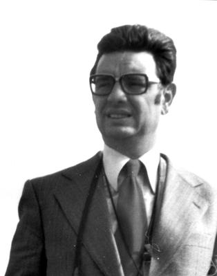 Foto di Jack van Lint